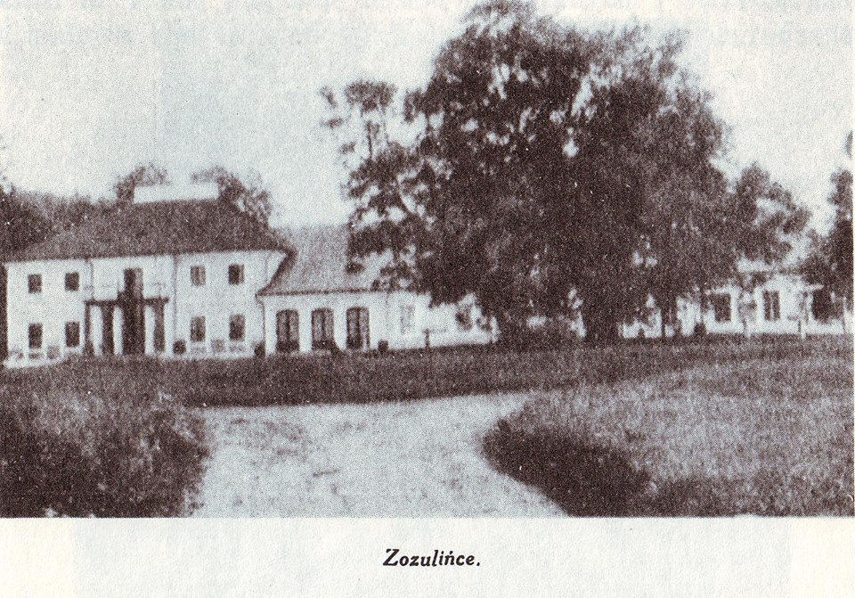 Zozulińce Wielkie - dwór